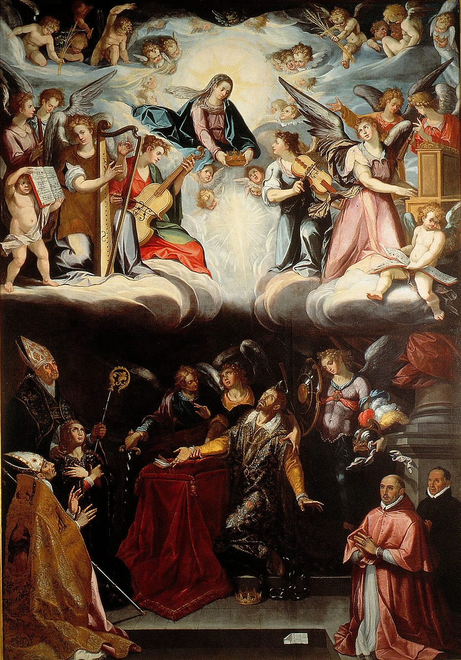 La obra representa el tránsito hacia la gloria del príncipe visigodo San Hermenegildo, que fue ejecutado por orden de su padre por su conversión a la fe católica.